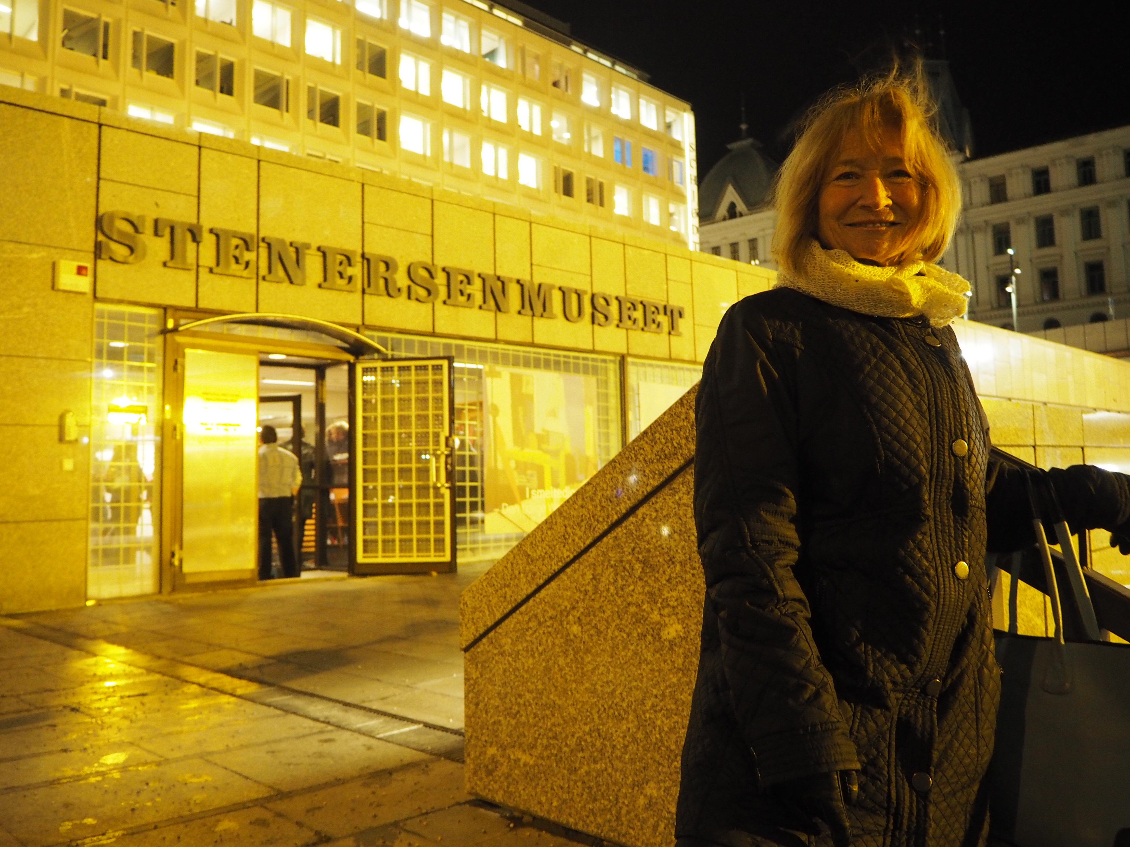 Janina Januszewska-Skreiberg, Stenersenmuseet, Oslo, 25.11.2015